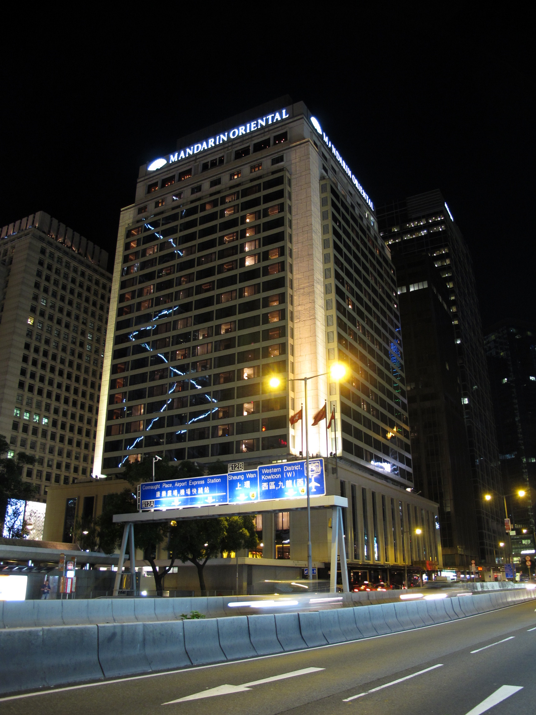 Mandarin Oriental Hong Kong